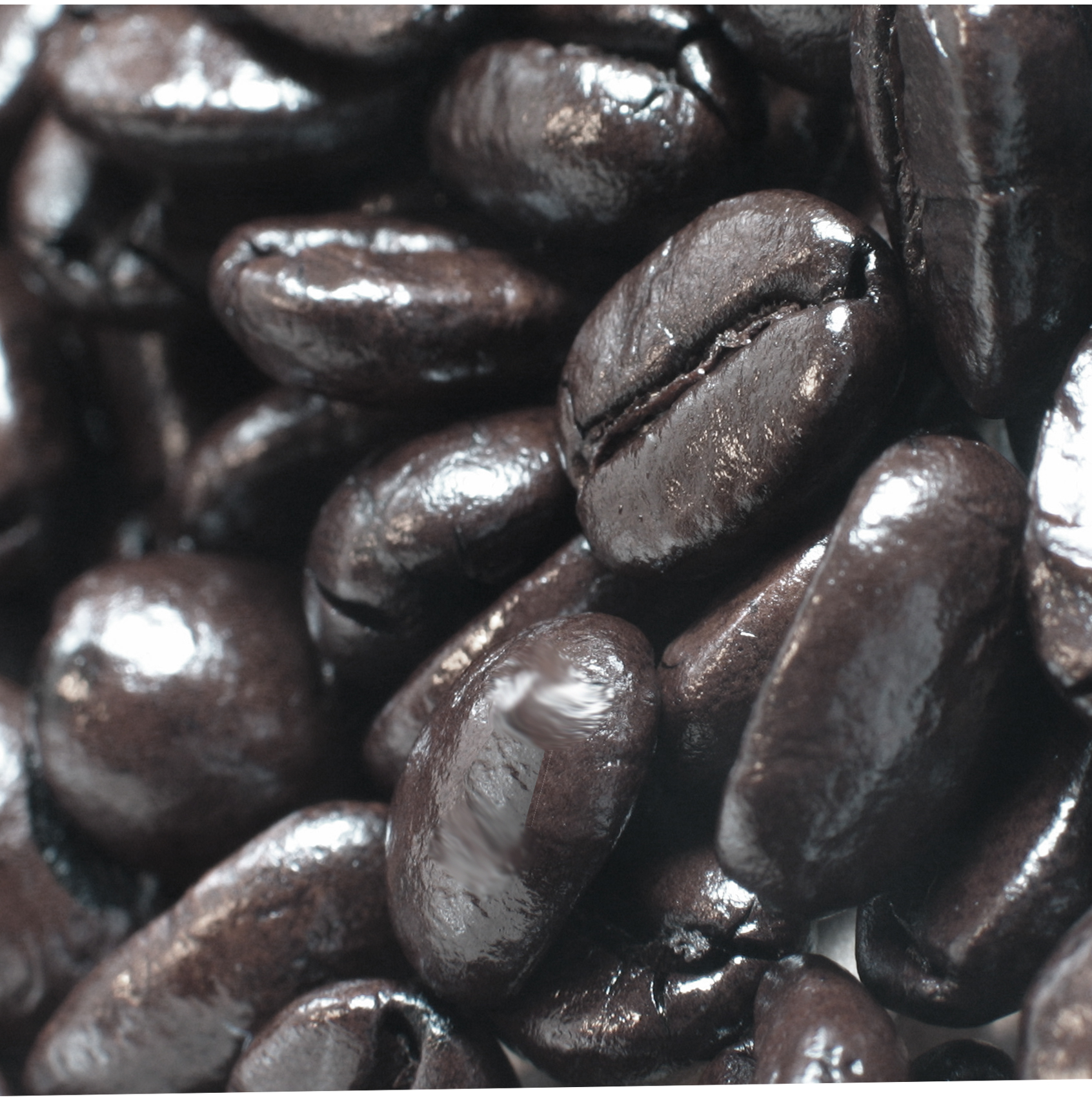 Granos de cafe de tueste torrefacto (con adición de azucar al final del proceso)